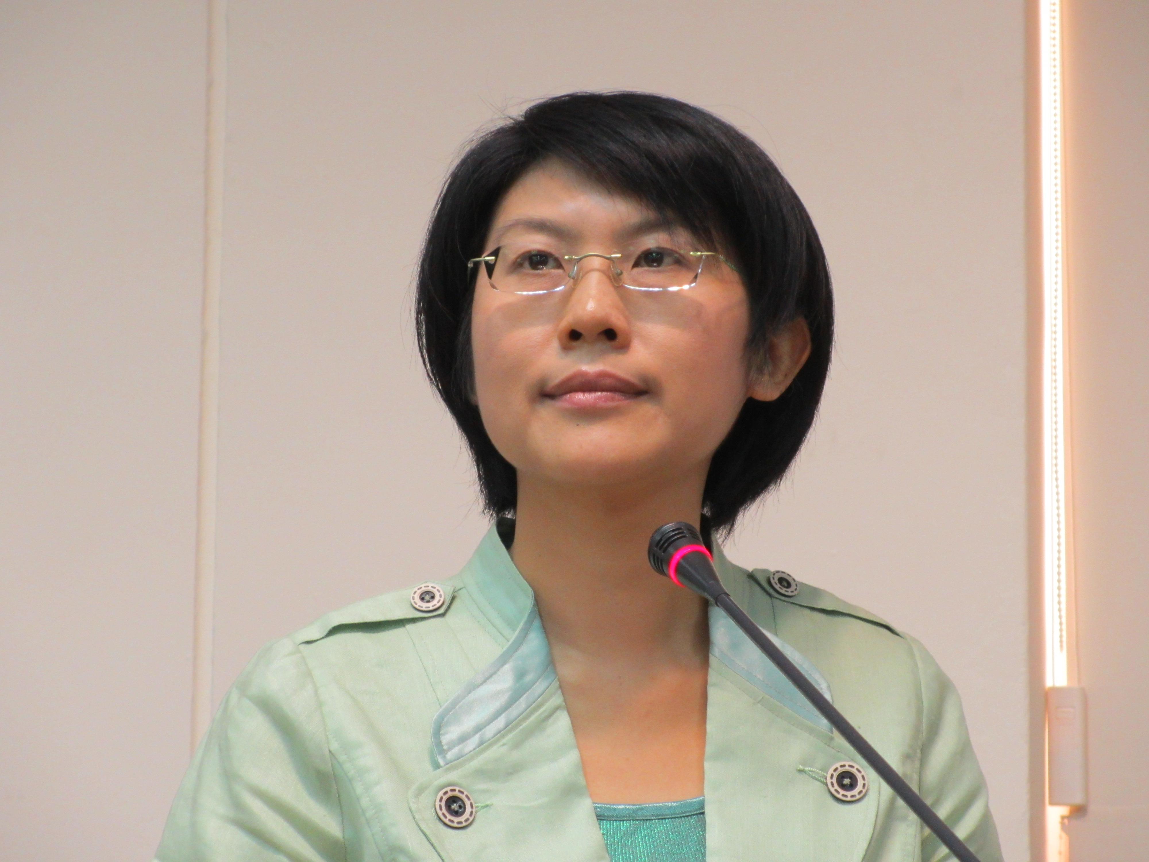 民进党立委 林岱桦(美国之音 张永泰拍摄)